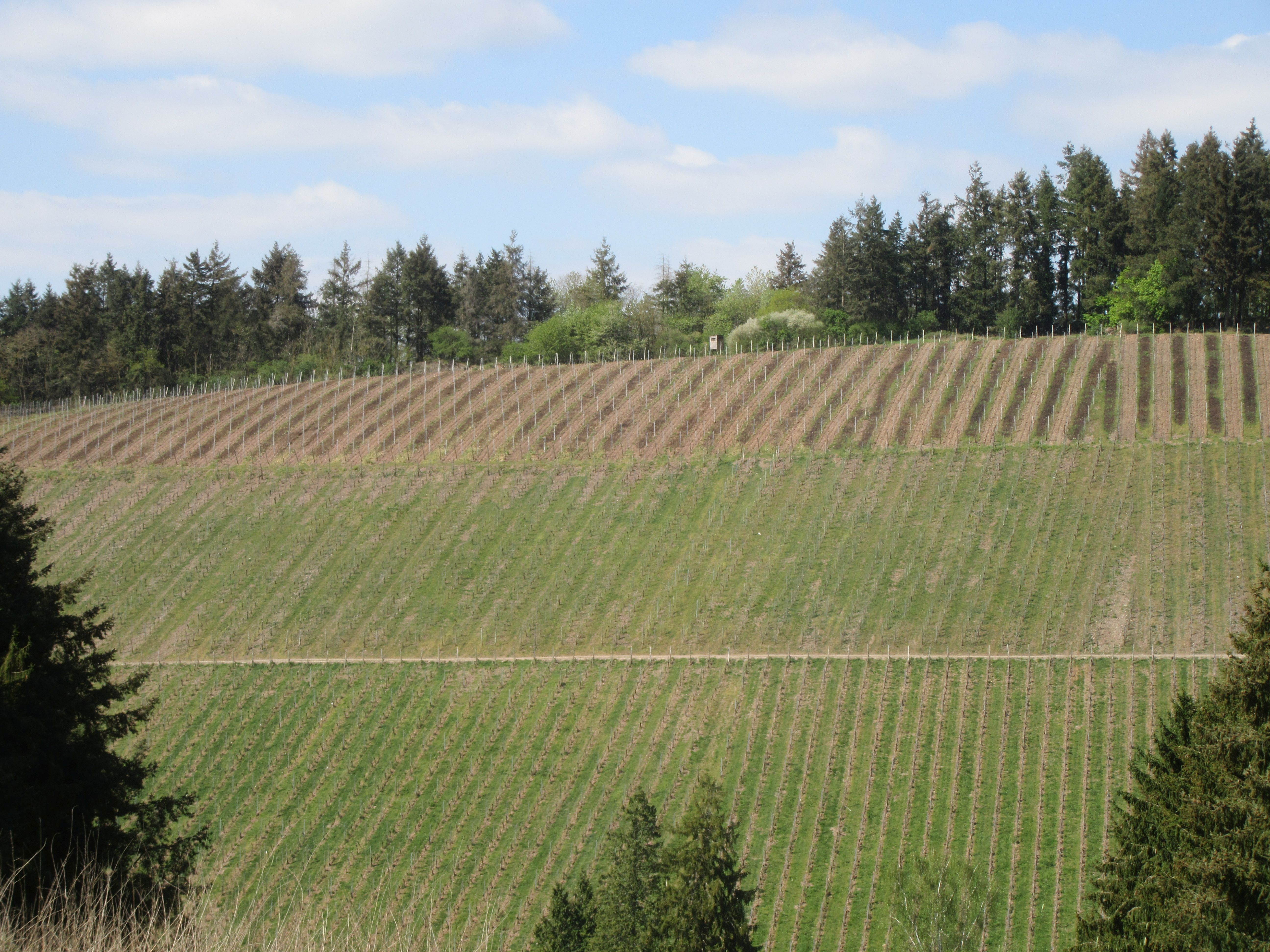 Blick zum Karthäuserhofberg, Trier-Ruwer/Eitelsbach